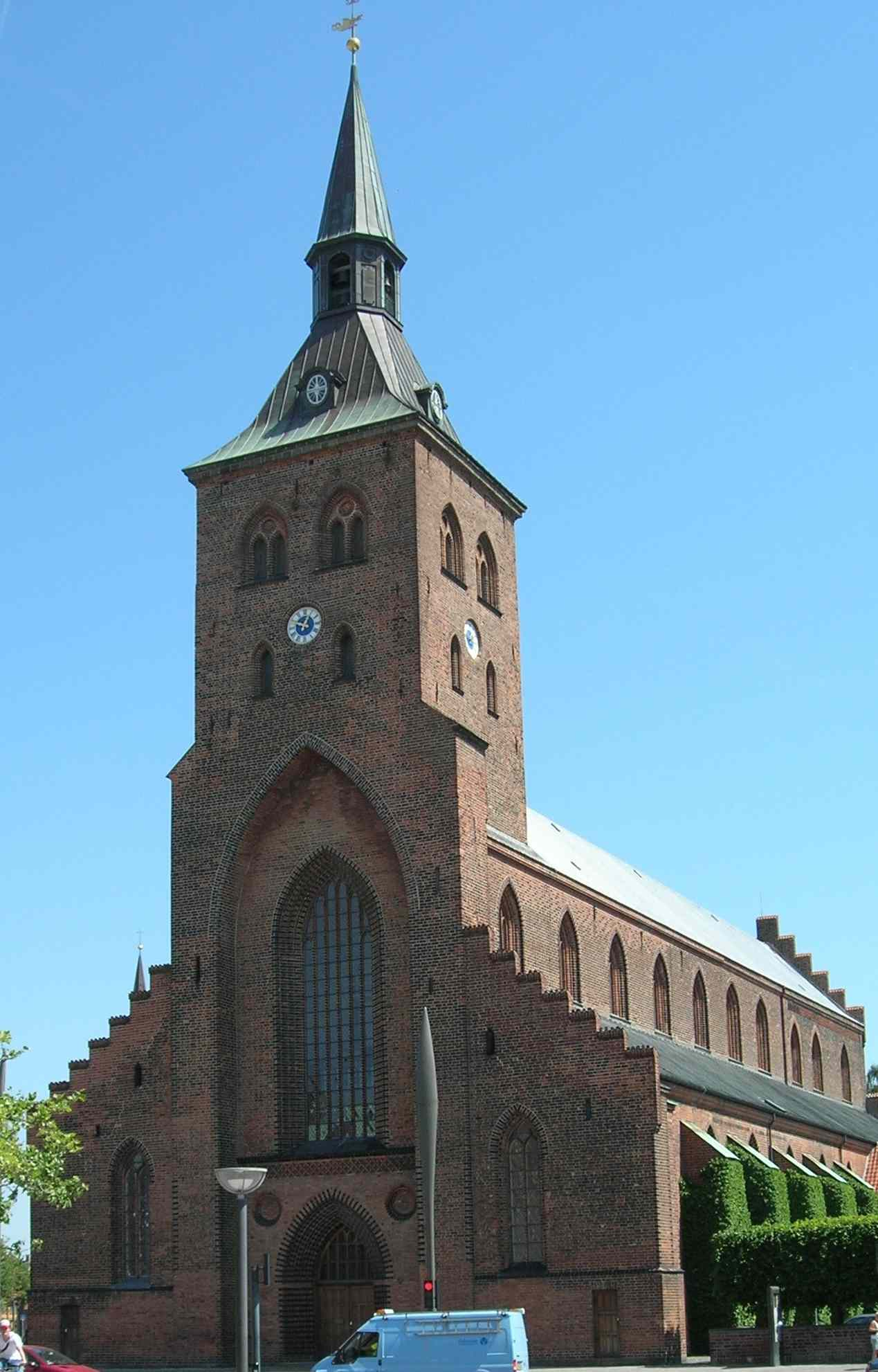 Bild der Sankt Knuds Kirche in Odense. andere Versionen: keine